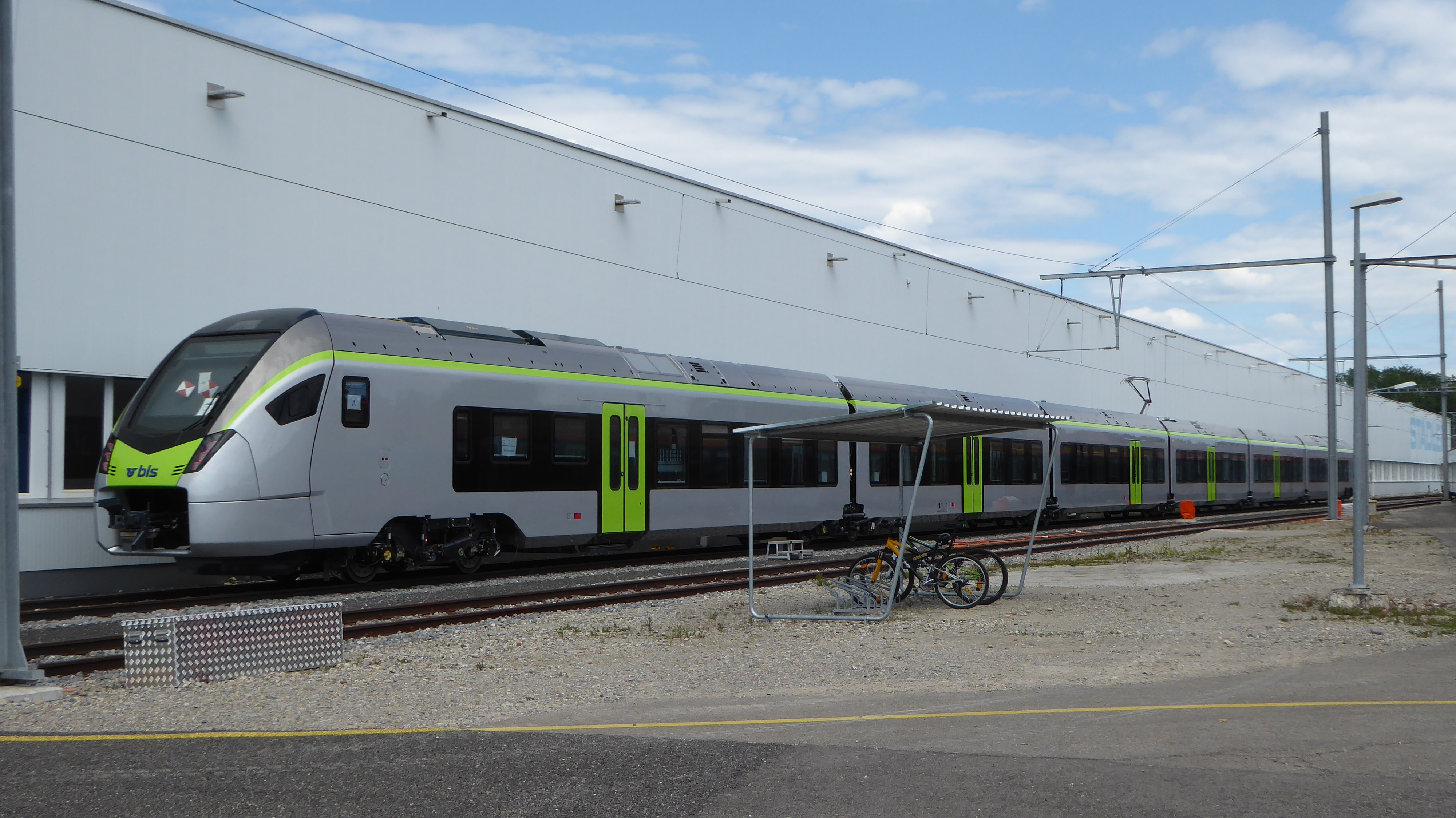 BLS RABe528 im Stadler-Inbetriebsetzungszentrum Erlen ( ErlenIm ersten Fenster ist folgende provisorische Anschrift zu finden:Masse 189 tLänge 105 mBremsgewicht 169 t (schleppen)94 85 7528 101-9